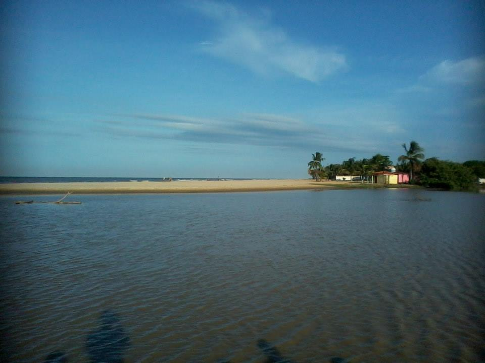 Foto tomada desde el río de la playa de Machurucuto.